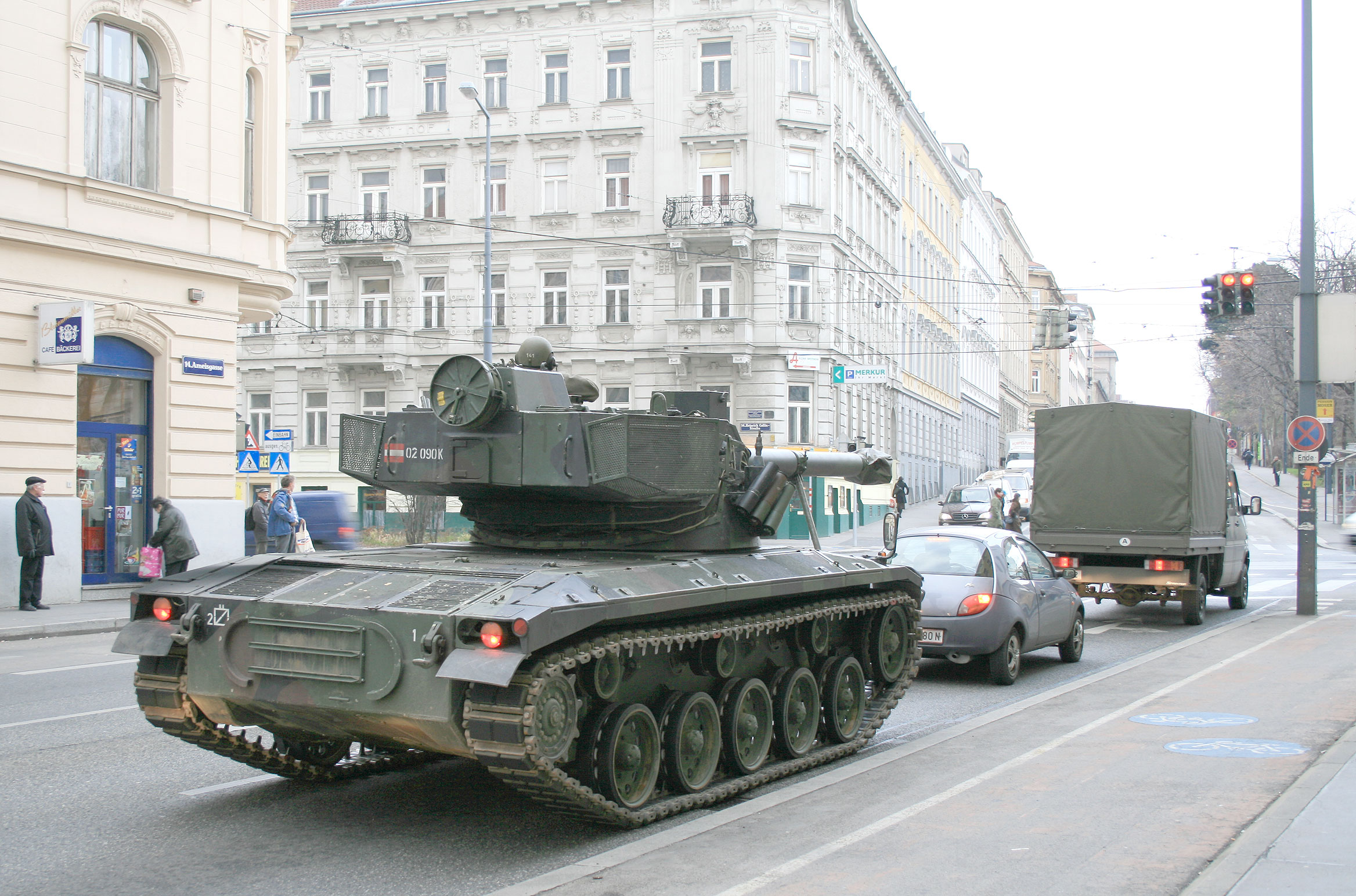 SK105 - Kürassier-Panzer des österreichischen Bundesheeres, fotografiert in Wien-Penzing / SK105 - Kürassier-tank of the Austrian army, seen in Vienna